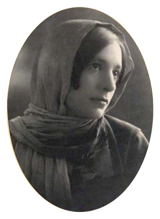 Vivita Cartier